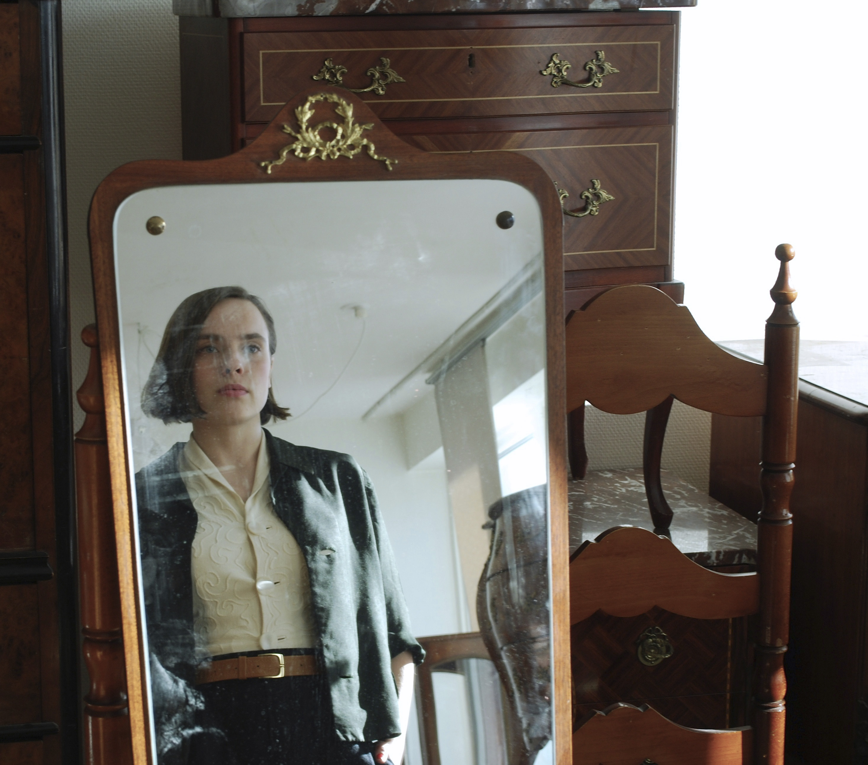 Fotograf: Celine Orman